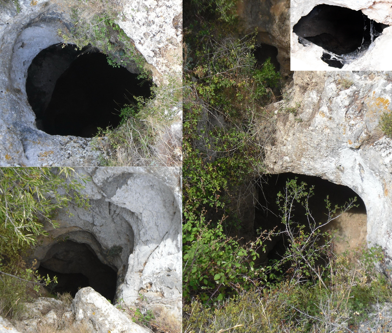 La Grotte des Fées à Leucate orifices d'accès